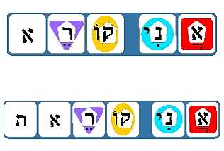 צורה צבע וצליל - אני קורא